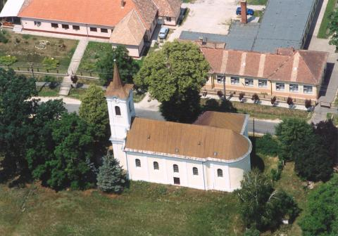 Nemesvid, Hungary, aerialphotography. Sarlós Boldogasszony római katolikus templom